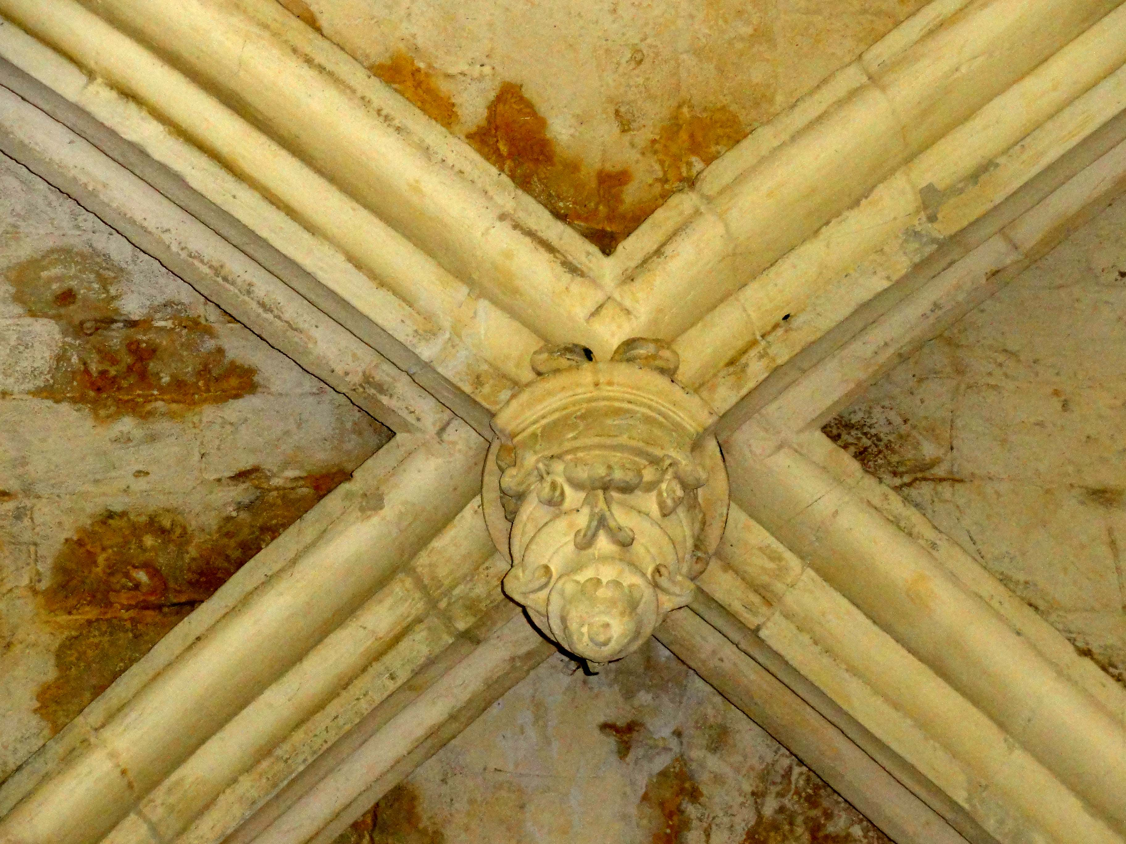 Intérieur de l'église (voir titre).